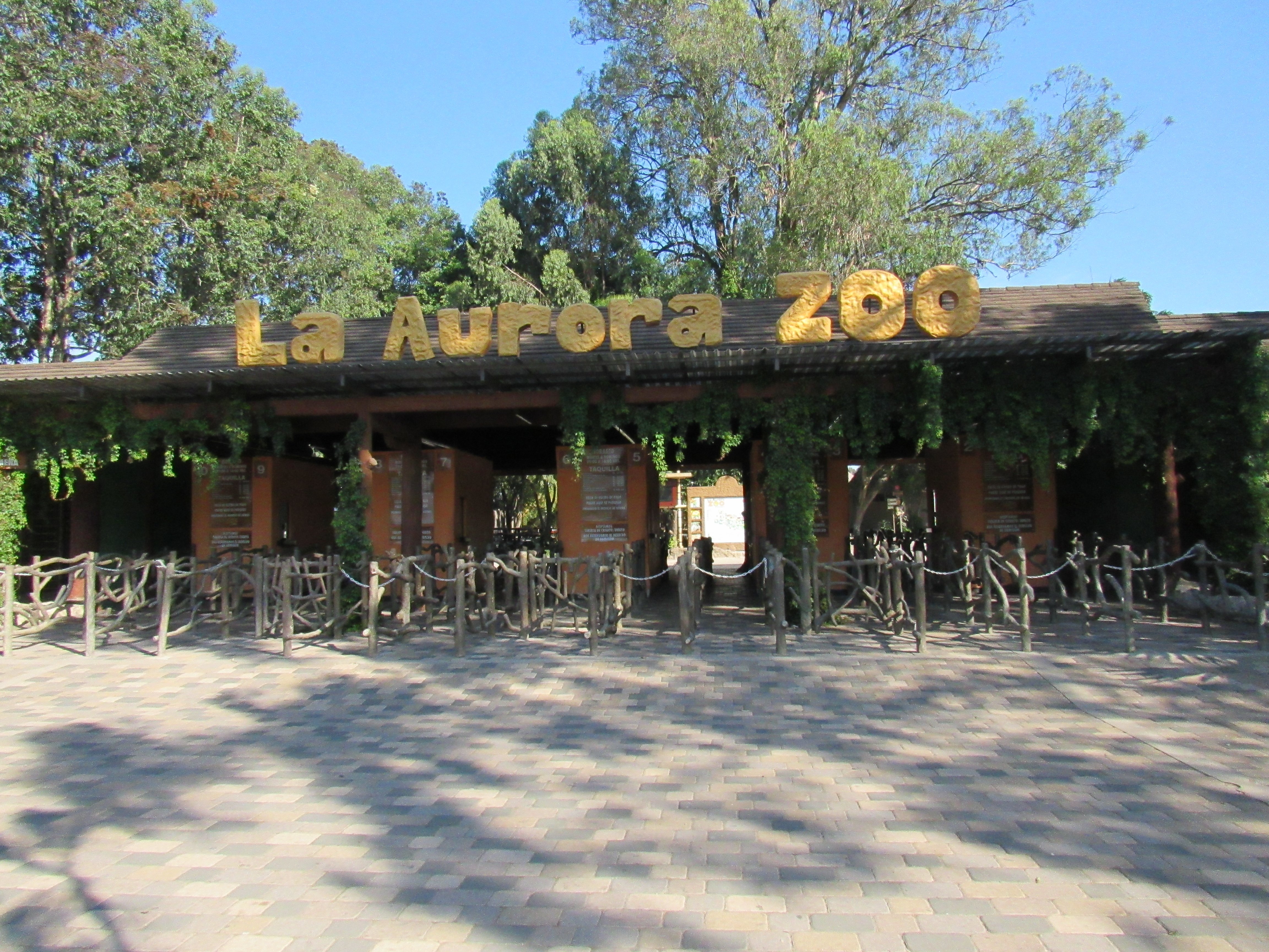 Imagen central de entrada a Zoológico de Guatemala "La Aurora"